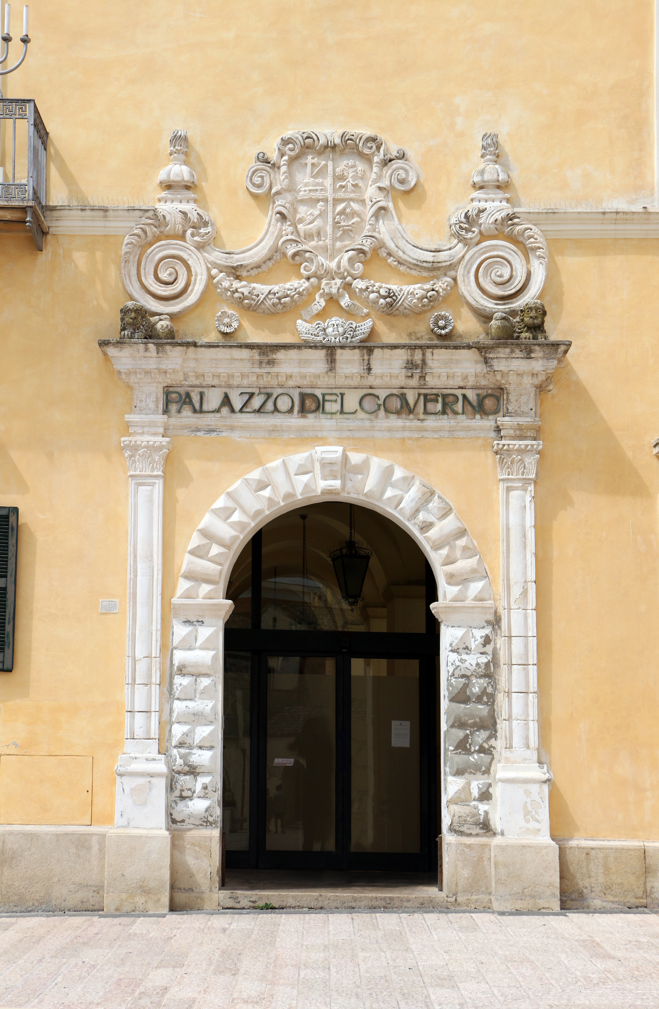 Palazzo della Prefettura This is a photo of a monument which is part of cultural heritage of Italy.